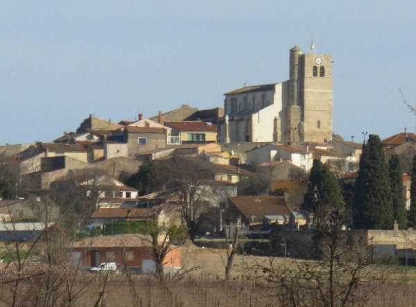 Vue du village de Corneilhan tyapih aô$ac jfèzç "Corneihan" agiyz